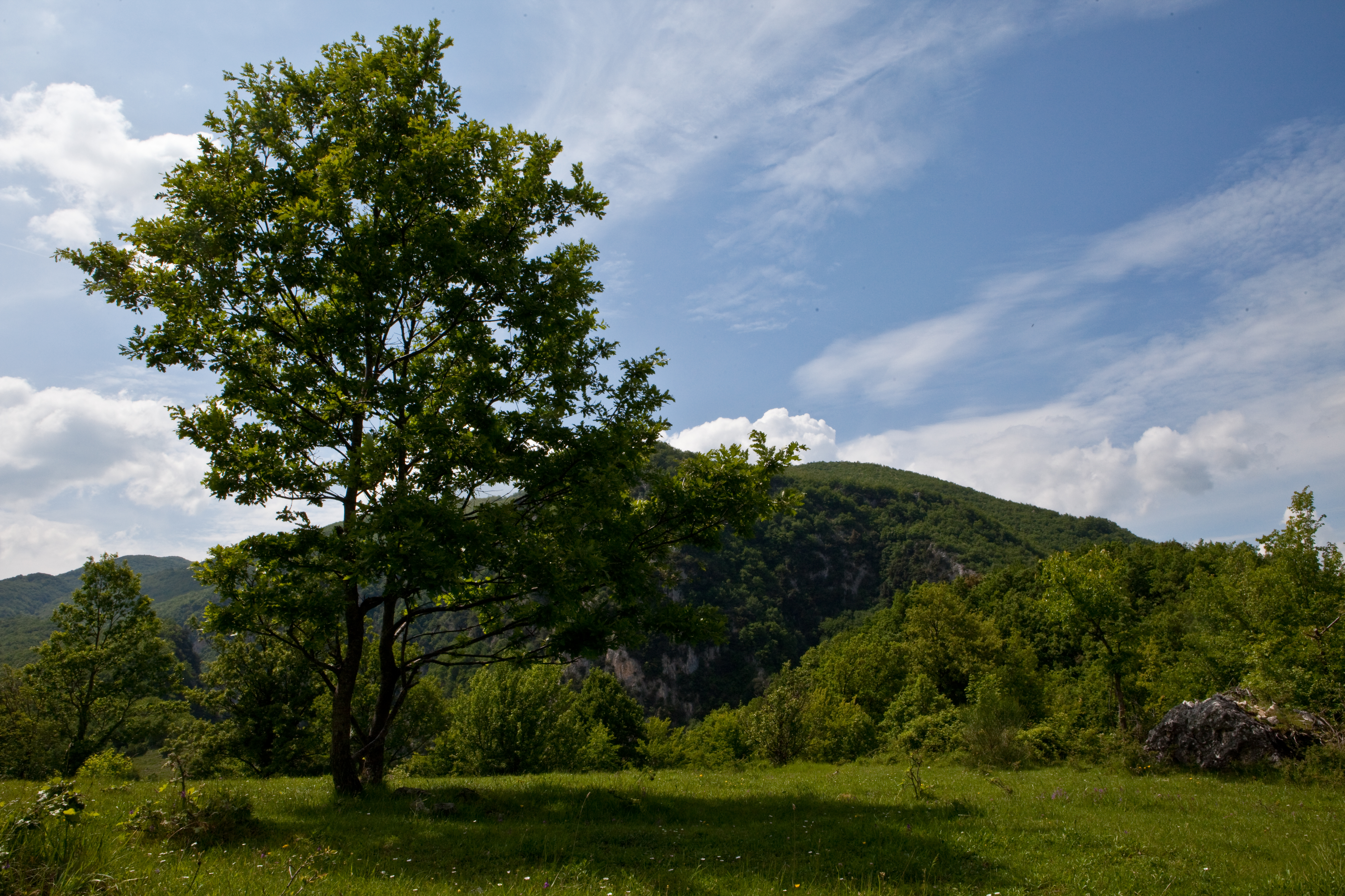 Riserva regionale di Guardiaregia-Campochiaro This is a photo of a monument which is part of cultural heritage of Italy. The authorisation for taking photos of this object was provided by the World Wide Fund for Nature Italy.